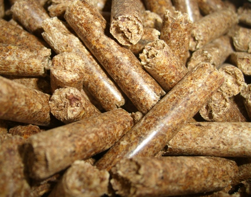 Погонажные изделия